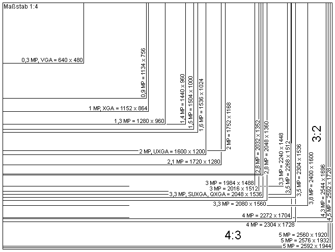 Megapixel-Auflösungen im Vergleich (1/2)